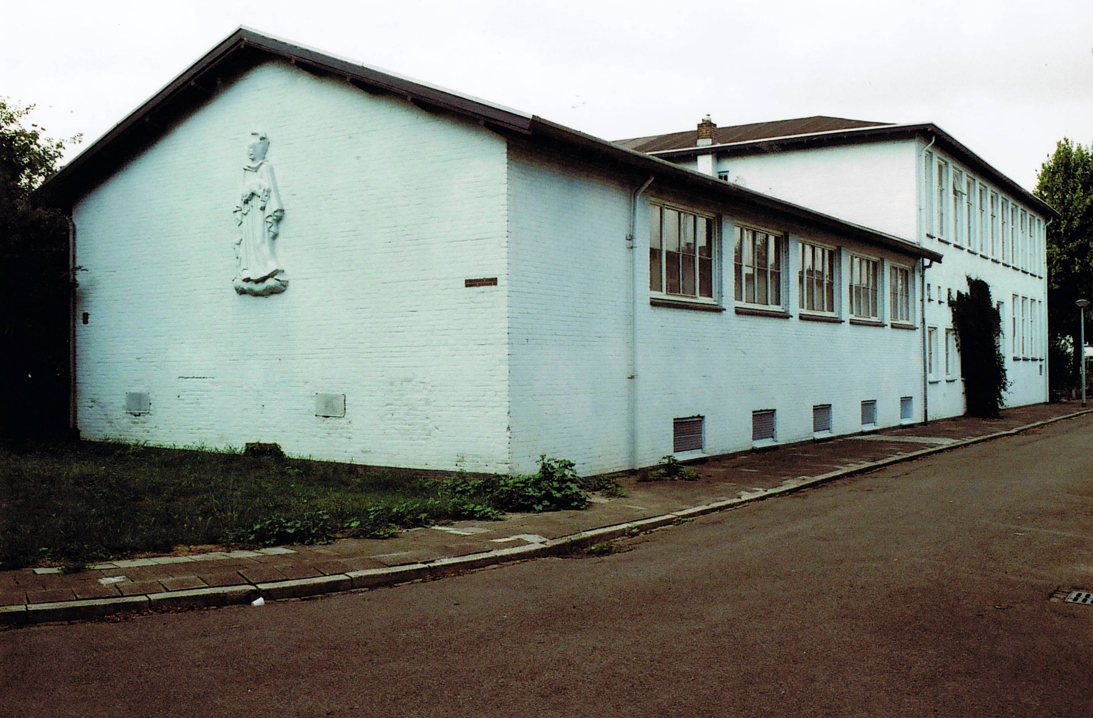 Maastricht 2007: Woonschool "De Ravelijn", gemeenschapshuis. Gebouwd 1953-56 naar een ontwerp van Frans Dingemans (stedebouwkundig plan) en Jos Muré (architectuur).